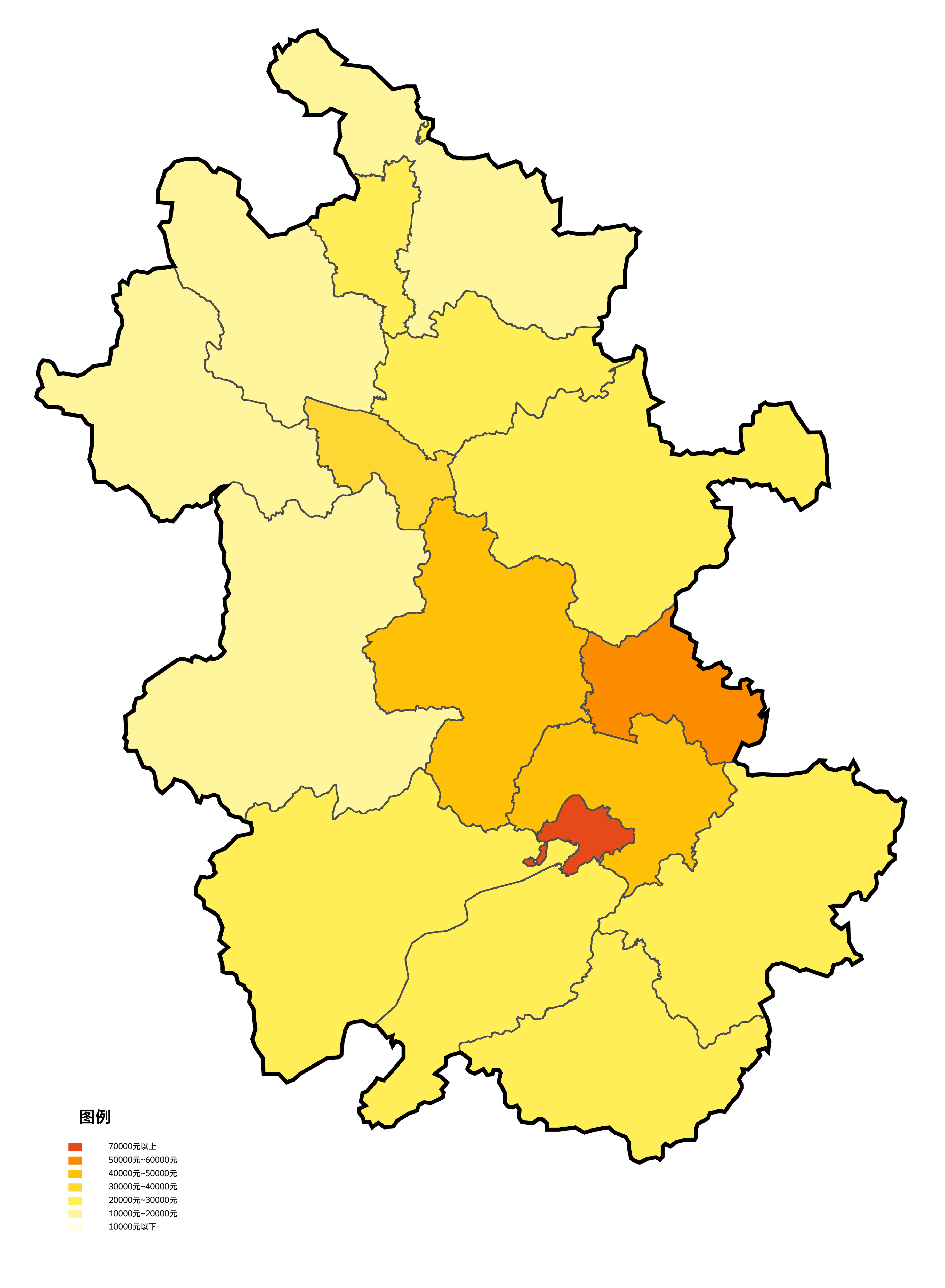 安徽省各地级市根据2011年人均地区生产总值填色地图